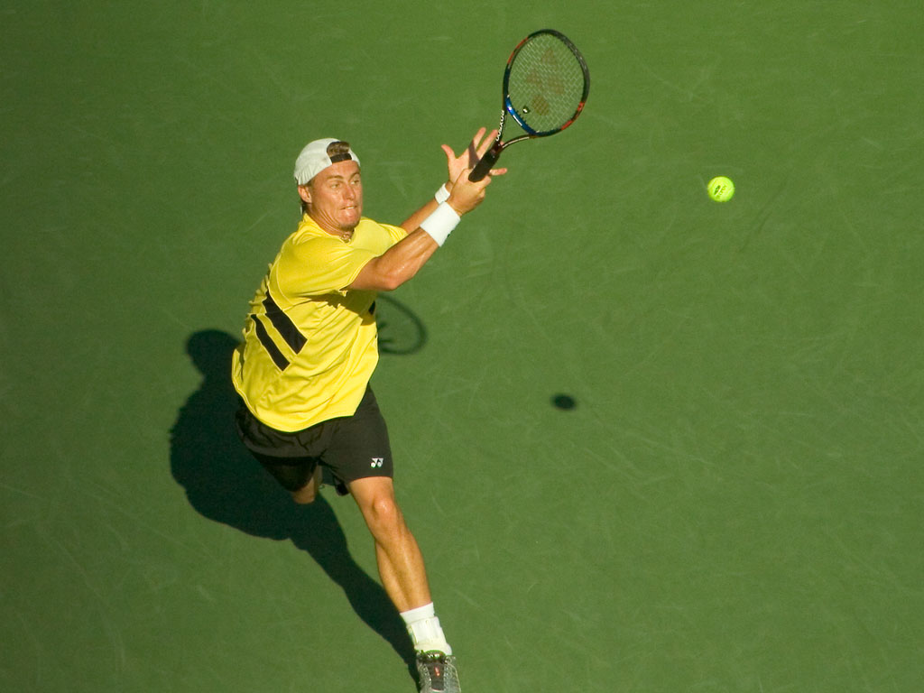 Lleyton Hewitt à l’ US Open 2005Hewitt